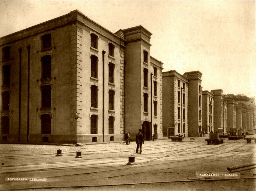 Almacenes Fiscales de Valparaíso en 1888. Fotografías de Félix Leblanc.